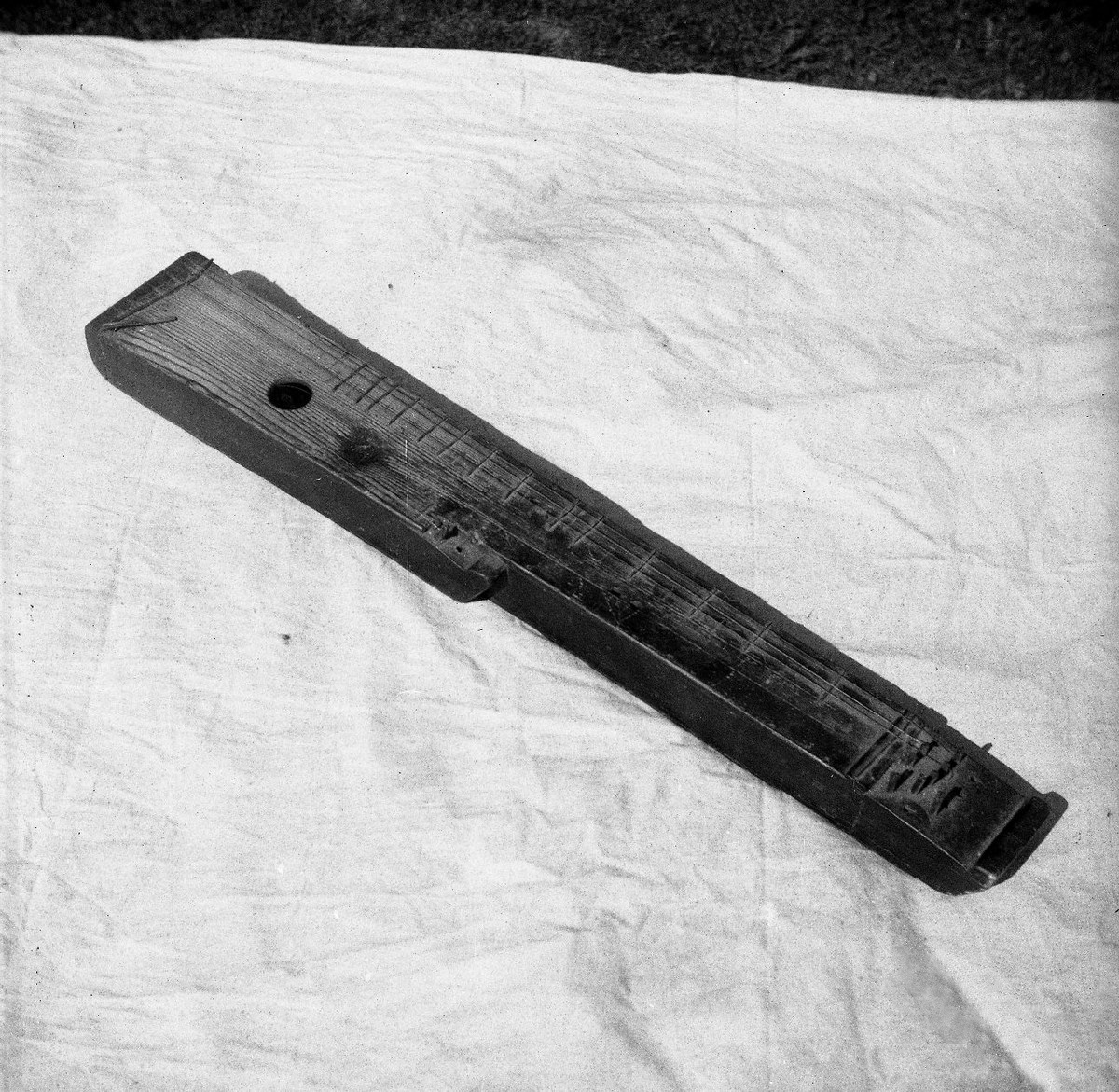 Štrohnnove "vrkovənce", Glogovica.